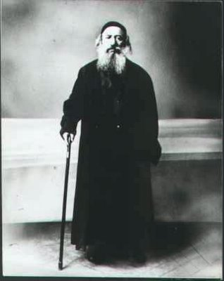 israel taub